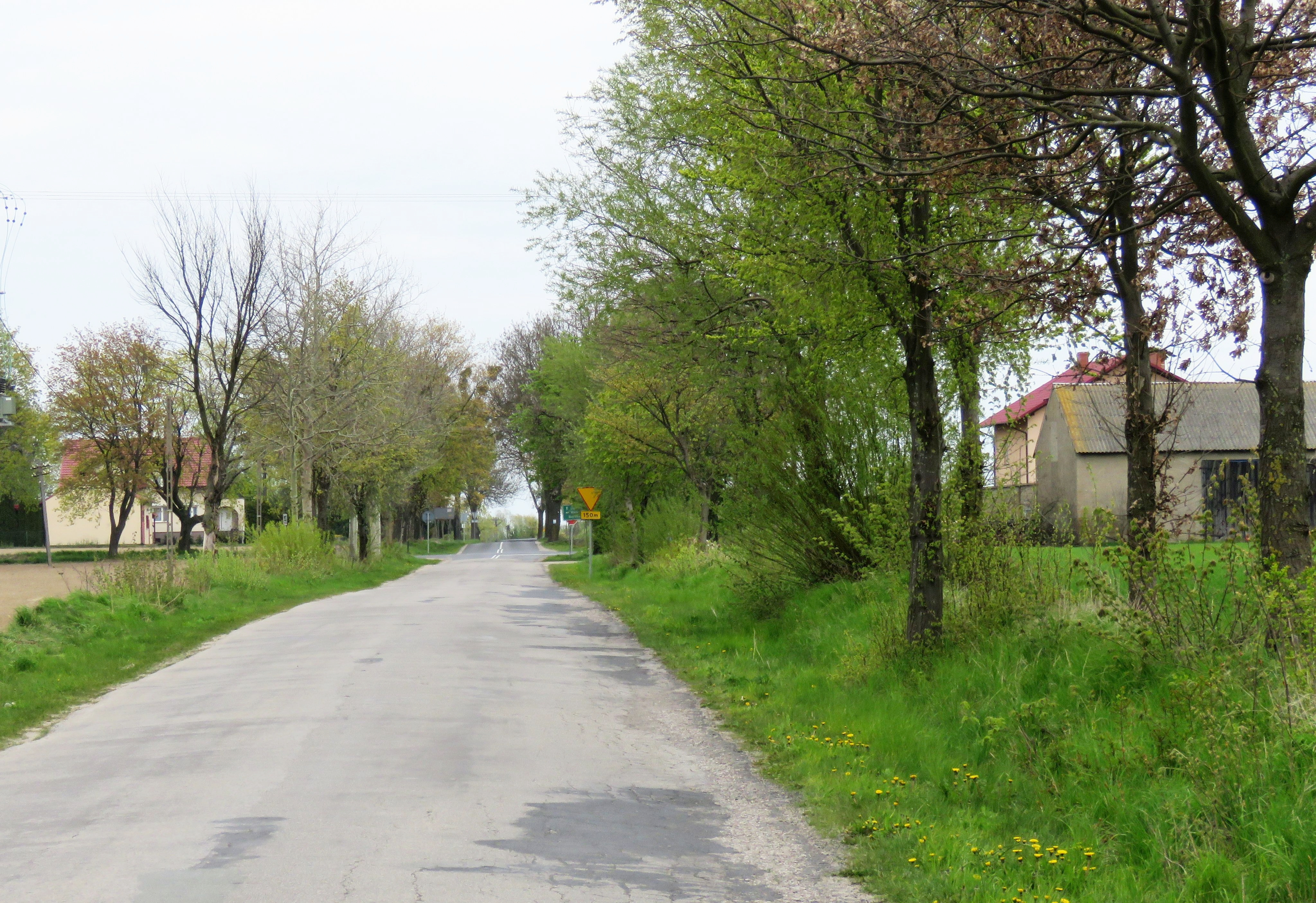 Smolniki, gmina Bobrowo